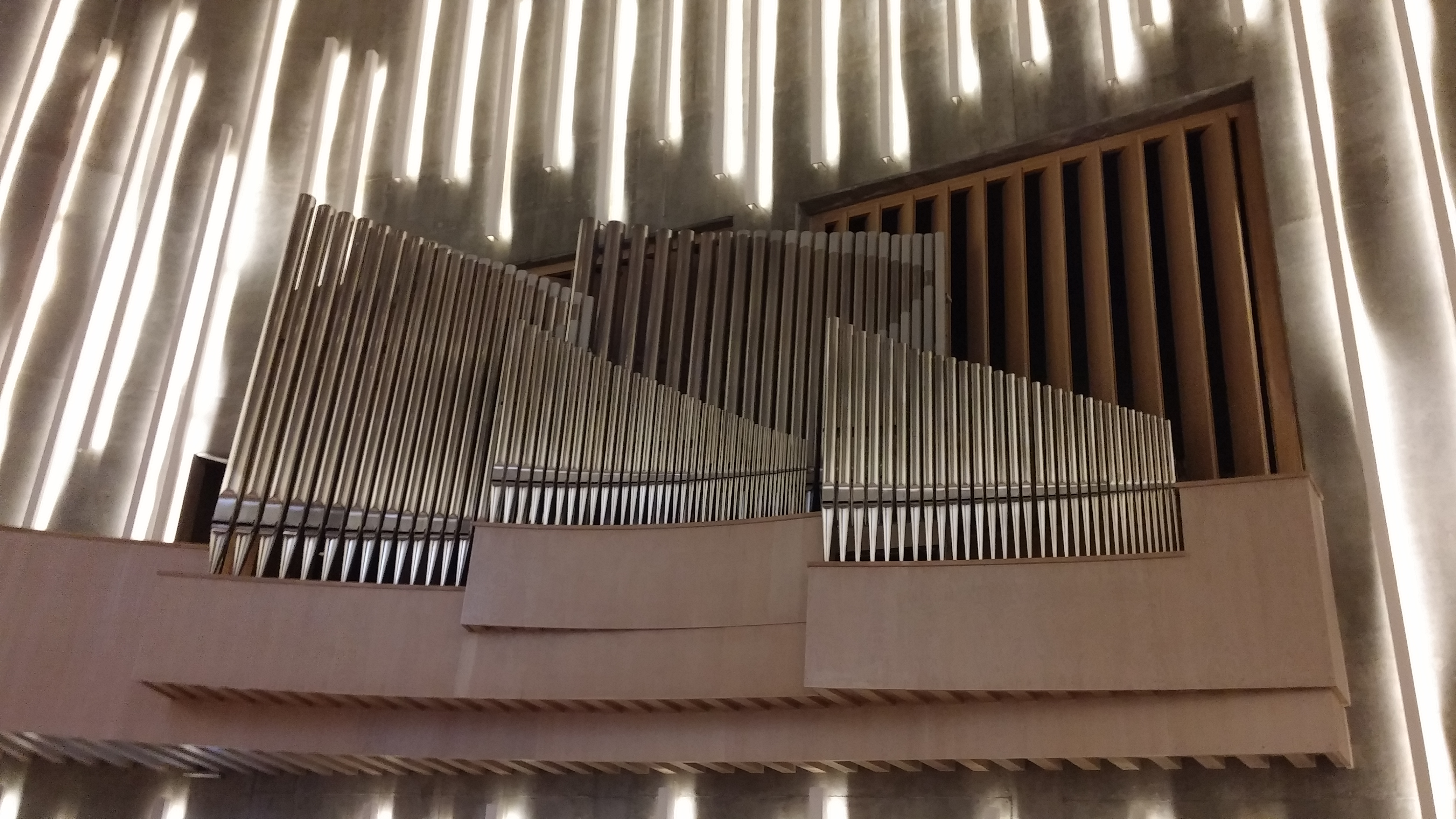 Kirkeorgelet